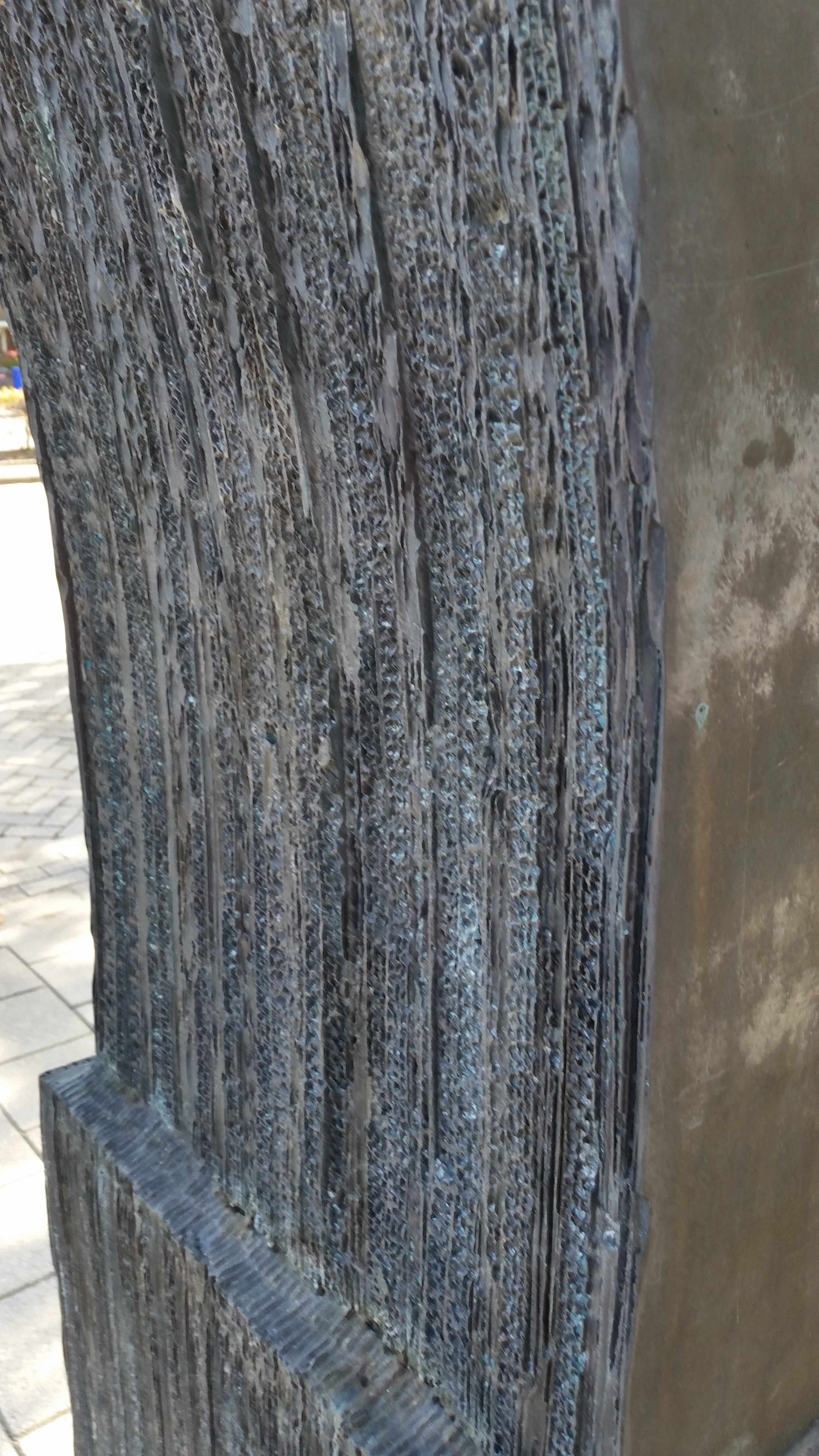 Golfkartonstructuur van titelloos werk van Piet Warffemius